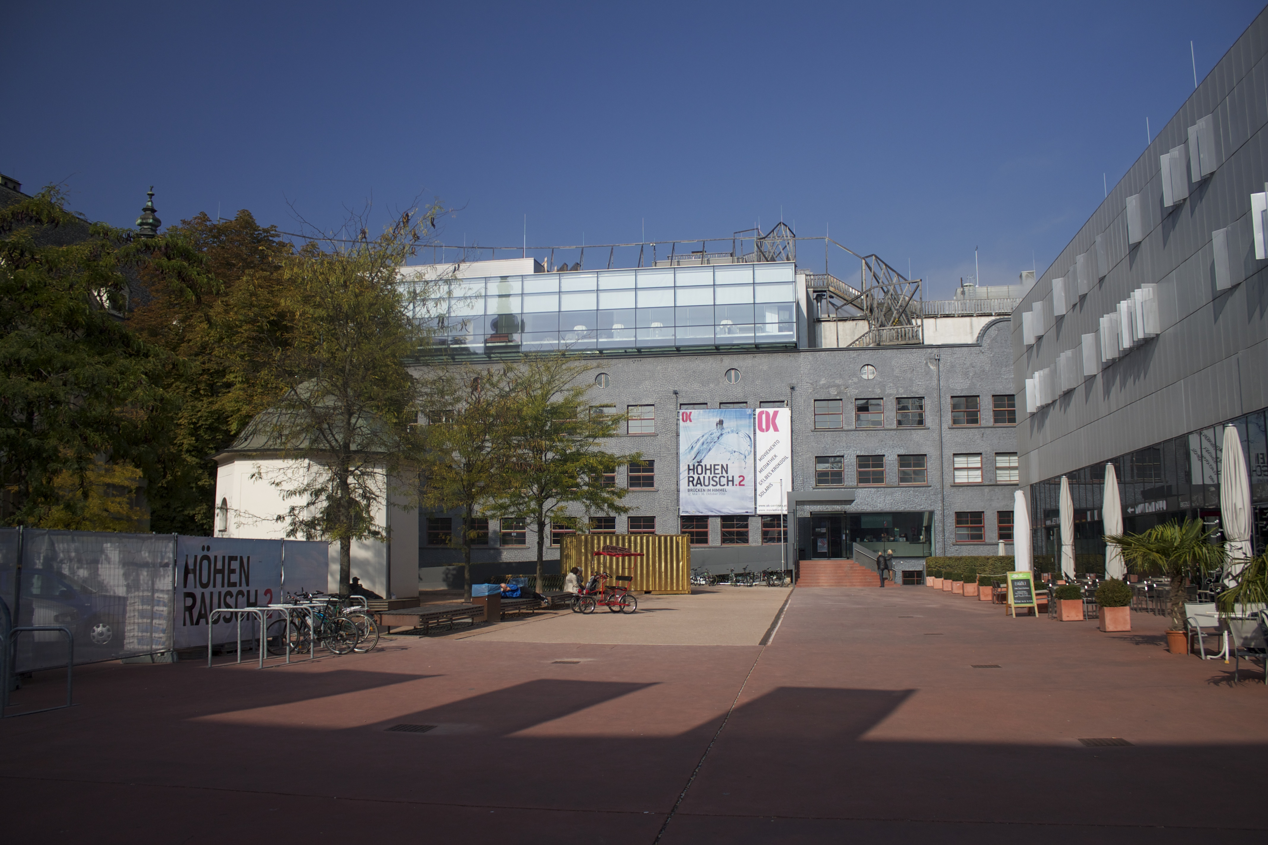 Frontansicht des Offenen Kulturhauses in Linz